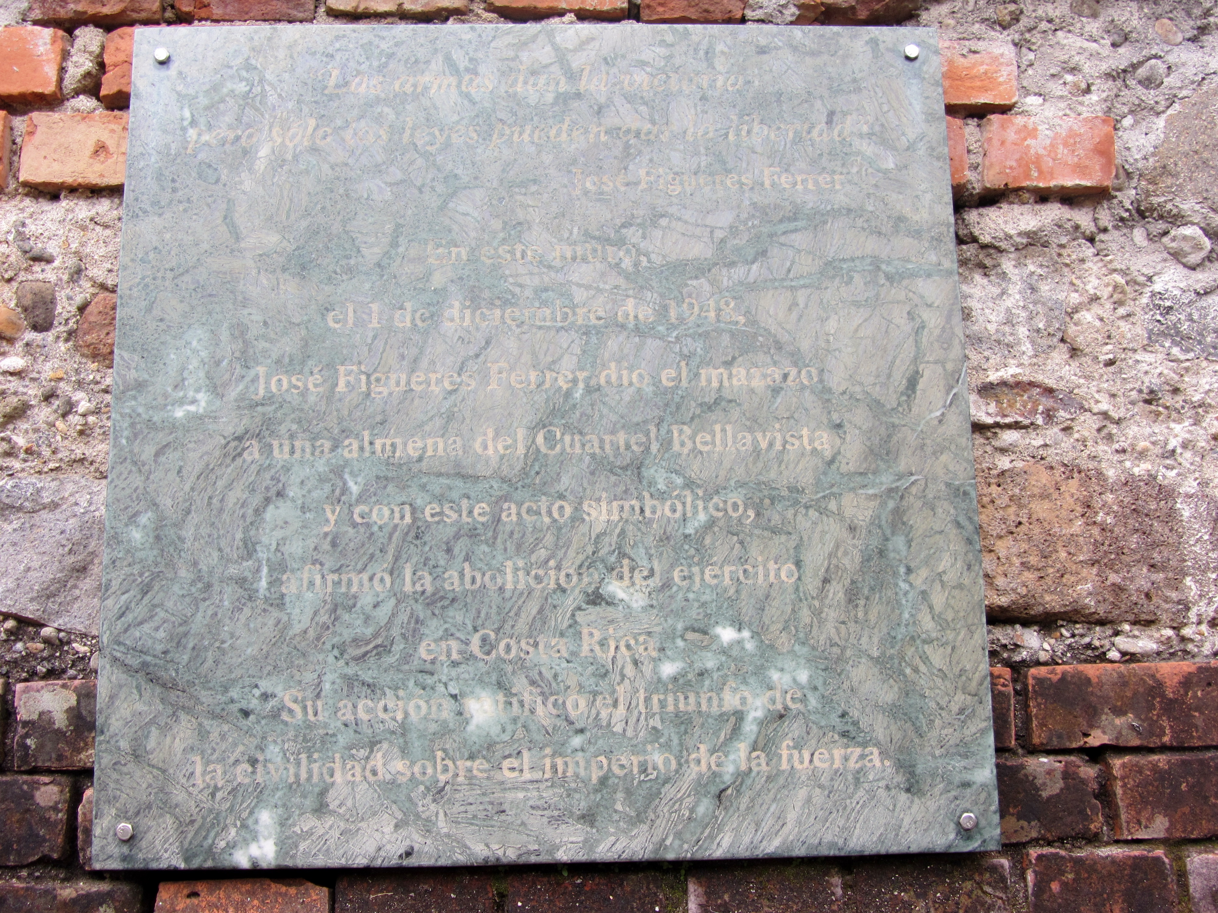 Placa conmemorativa del acto simbólico de la abolición del ejército. Museo Nacional de Costa Rica